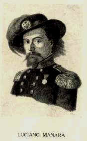 Luciano Manara, patriota italiano .